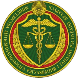 Эмблема Міністэрства гандлю Беларусі